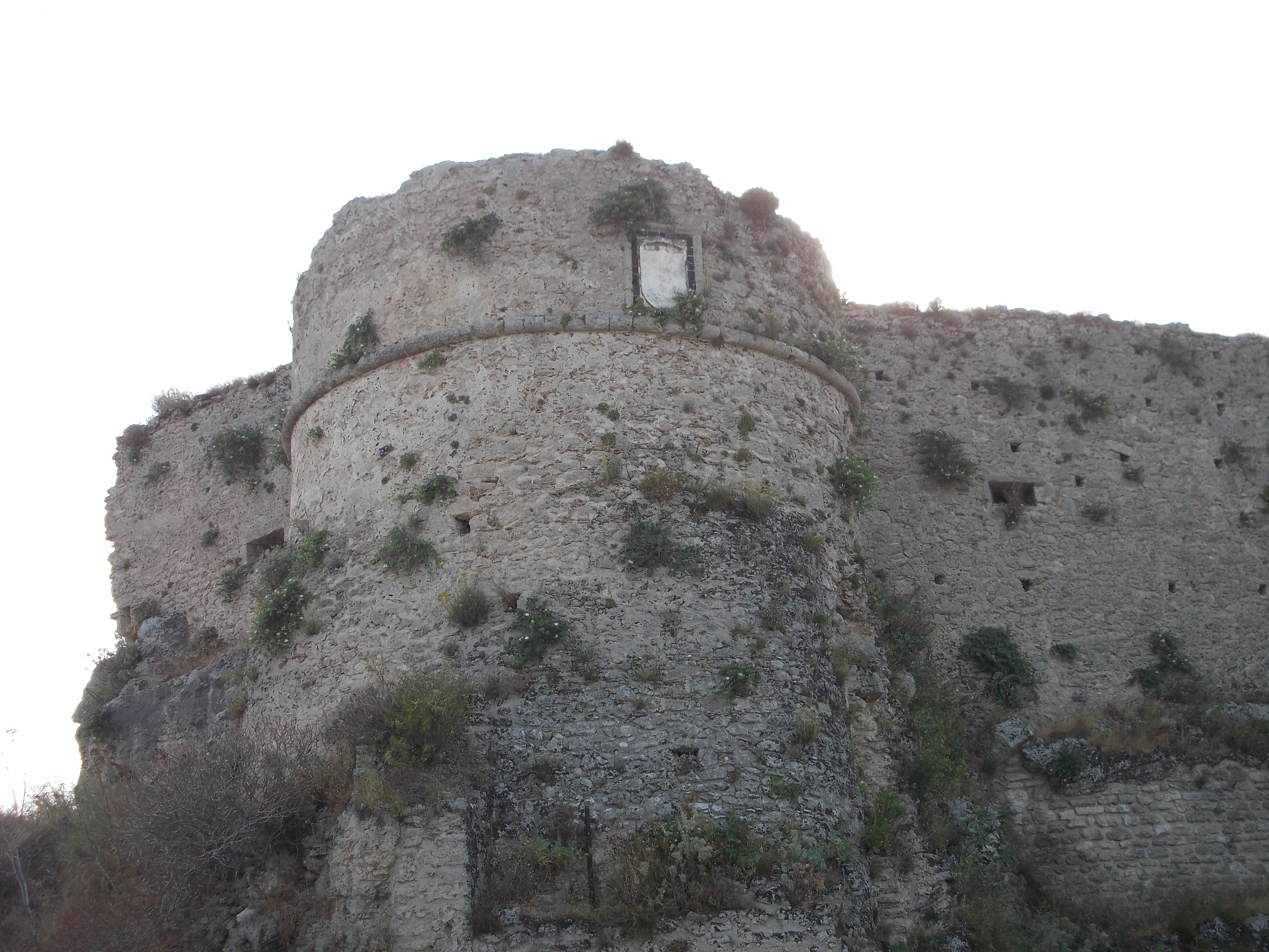 Castello Normanno Sec.X di Gerace.